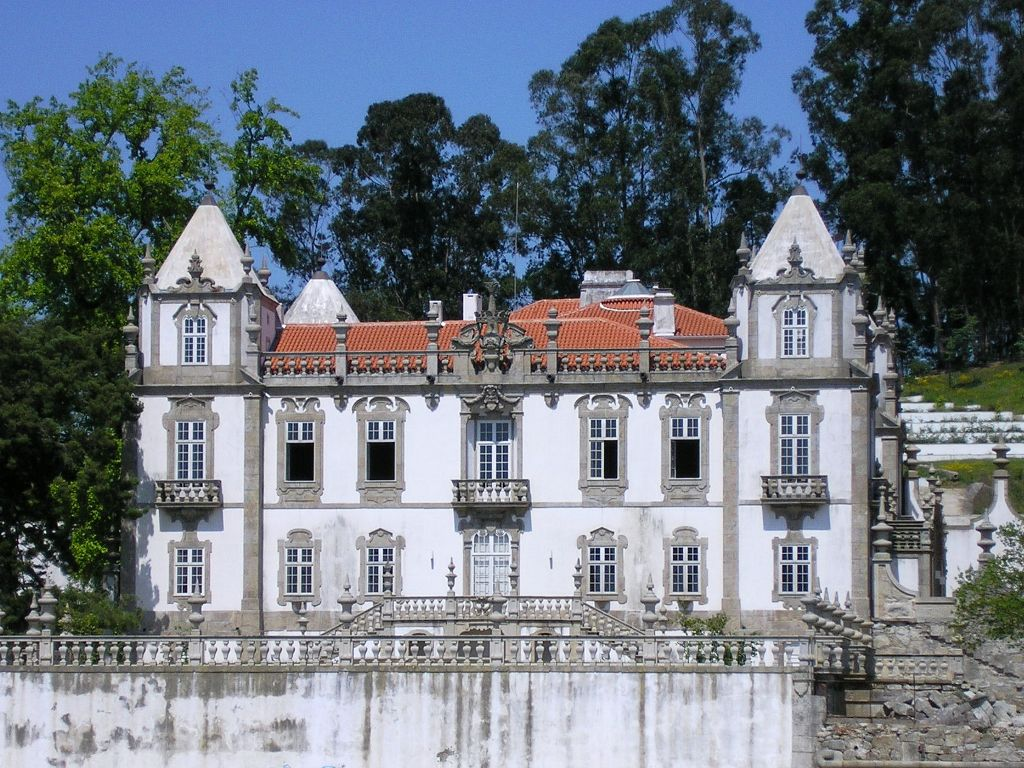 Freixo Palace in Porto, Portugal